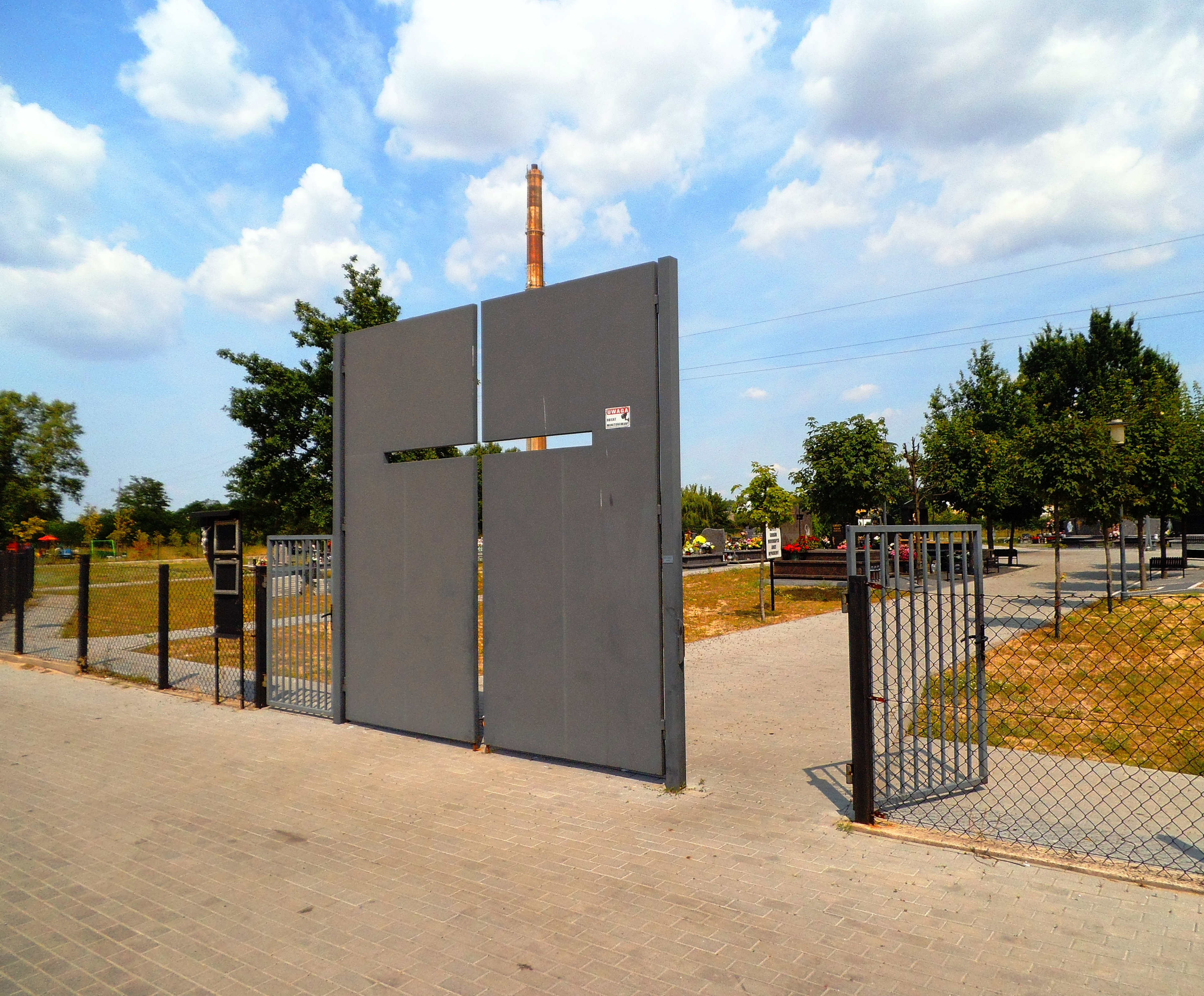 Cmentarz Matki Bożej Nieustającej Pomocy w Toruniu